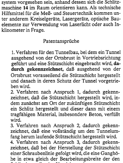 Screenshot von amtlich veröffentlichten Patentansprüchen einer Patentanmeldung